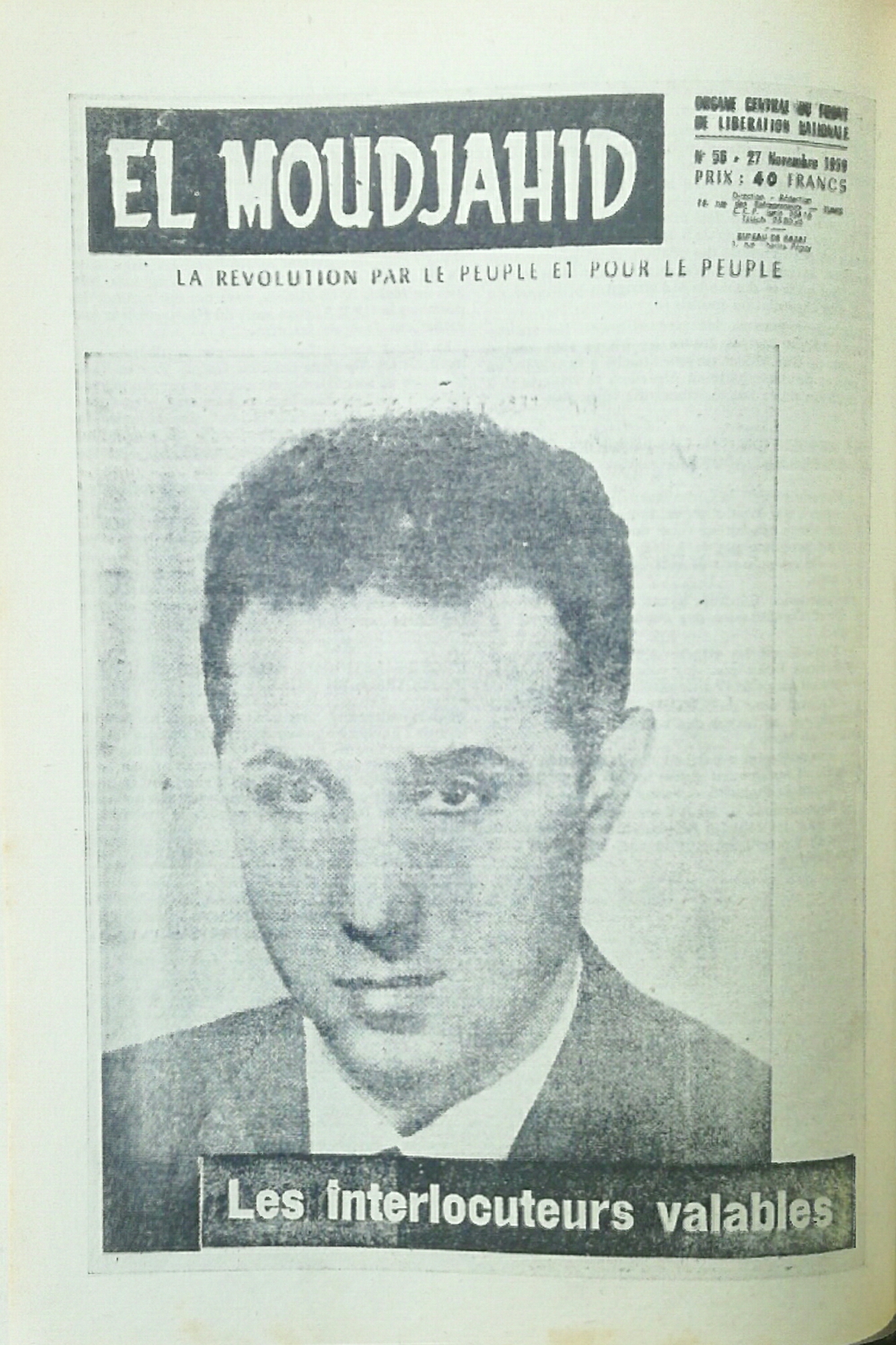 El Moudjahid Fr [56] - 27-11-1959 - Les interlocuteurs valables